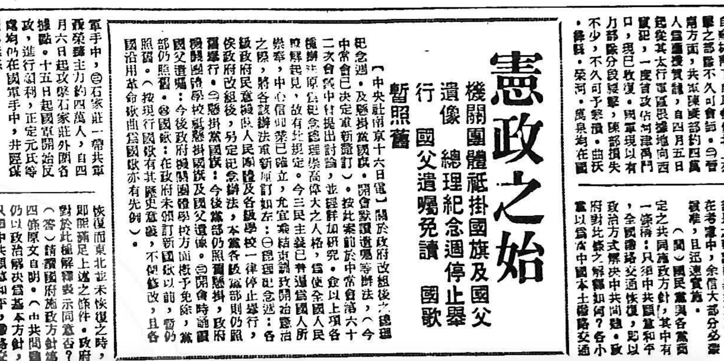 中文（中国大陆）: 1947年4月18日，上海《大公报》公布中央通讯社报道中华民国国民政府消息：为行宪之目的，自即日起不再于公开场合悬挂中国国民党党旗，仅悬挂国旗与国父孙中山画像。